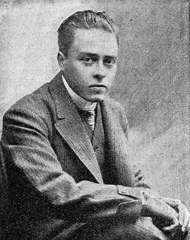 Luis Antón del Olmet, fotografía en Vida Gallega 1909